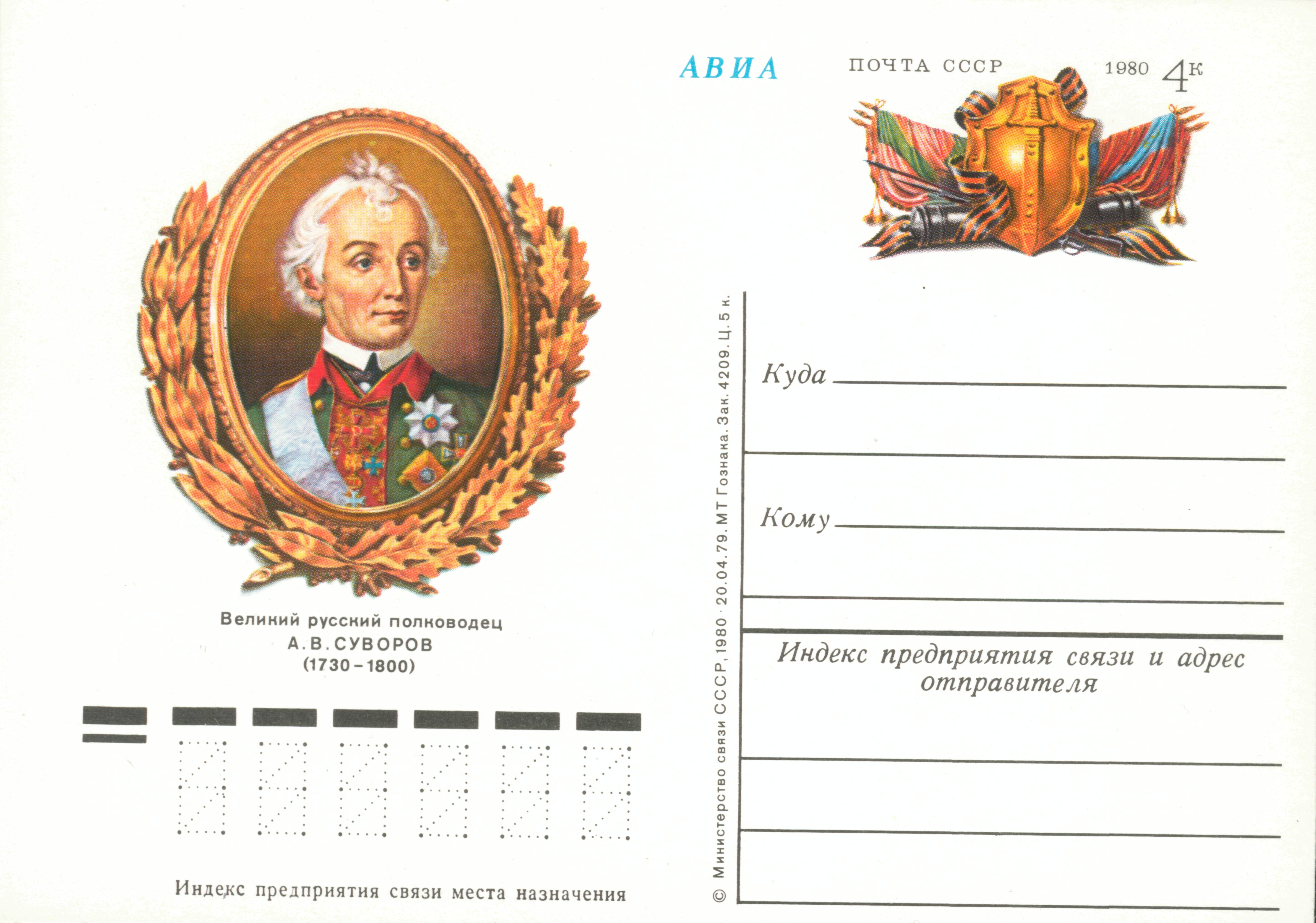 Suvorov USSR original stamp 1980 Великий русский полководец Александр Васильевич Суворов. Односторонняя почтовая карточка СССР с оригинальной маркой. 1980 г. Тираж не указан.